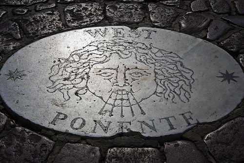 Die Plakette "West Ponente" am Fuße des Obelisken auf dem Petersplatz in der Vatikanstadt